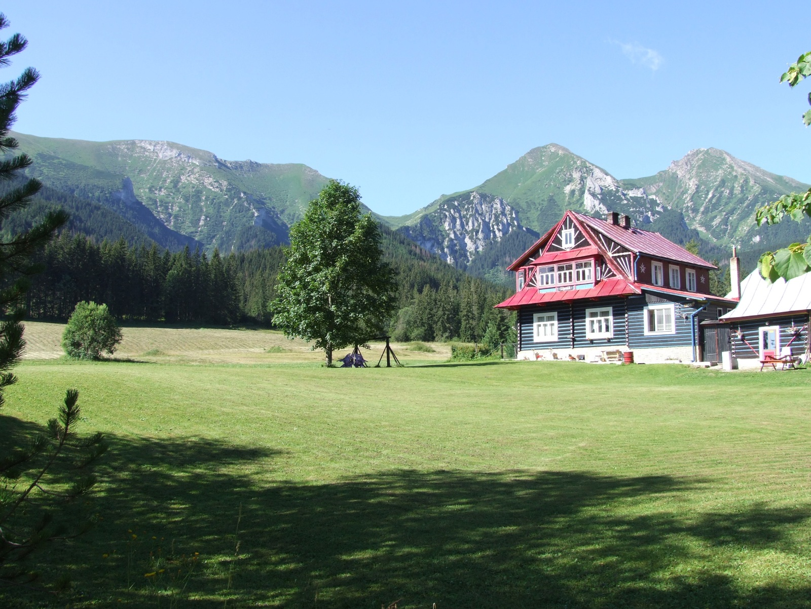 Polana Monkowa w Dolinie Bielskiego Potoku (Żdziar). U góry Szalony Wierch, Głośna Skała, Płaczliwa Skała i Hawrań